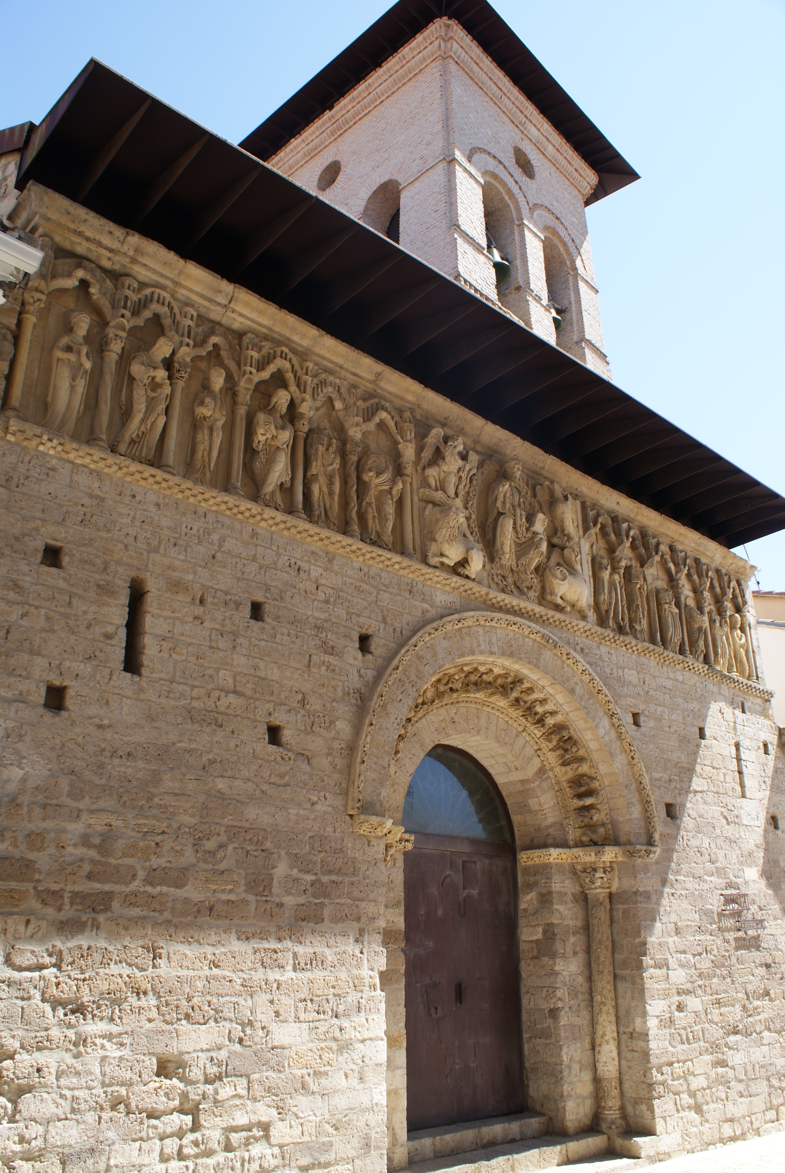 Iglesia de Santiago (Carrión de los Condes, provincia de Palencia, España). Se aprecia el sobresaliente pantocrátor y tetramorfos de este monumento Románico.